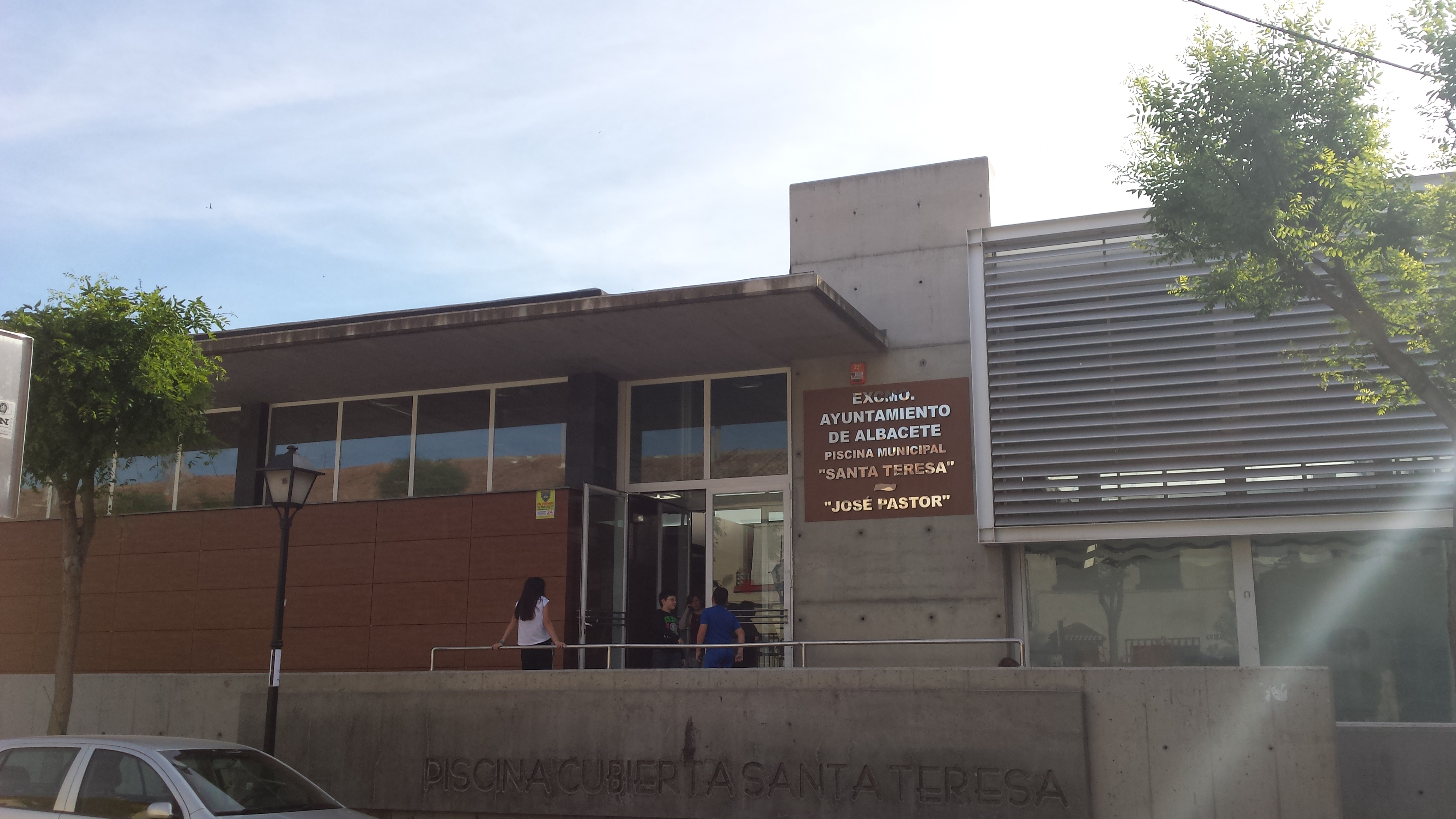 Piscina Cubierta Santa Teresa. IMD. Albacete